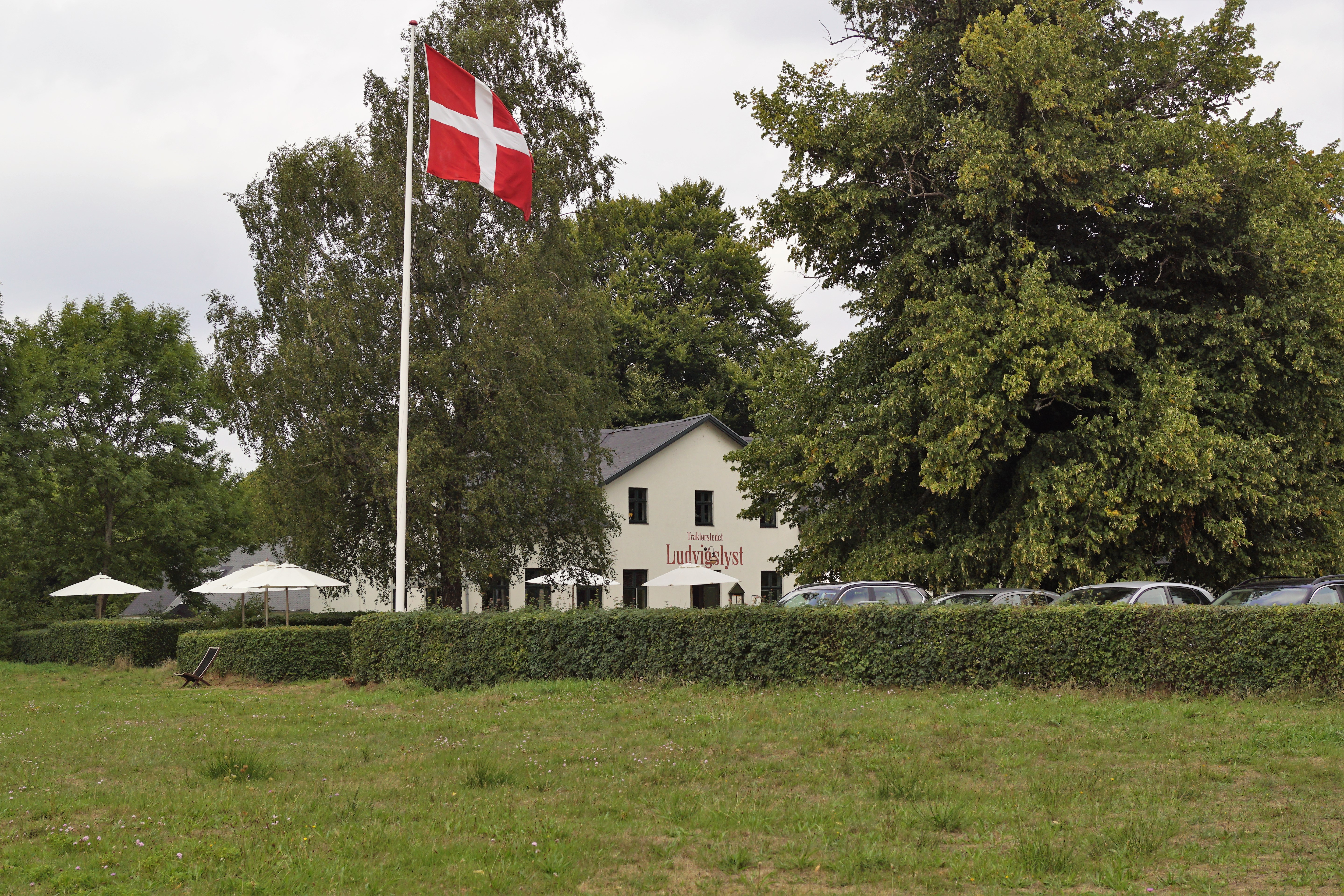 Ludvigslyst 2018